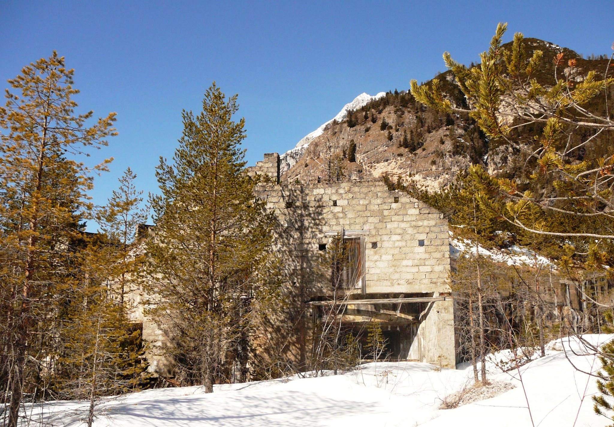 opera 2 cimabanche